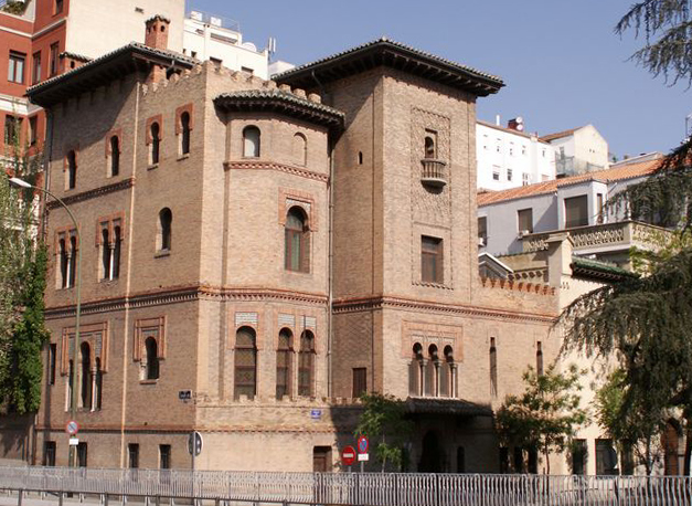 Instituto de Valencia de D. Juan. Antiguo Hotel de D. Guillermo de Osma. Paseo de Eduardo Dato 29. Obra de Enrique Fort Guyenet de 1889 - 1893, ha sufrido posteriores reformas y ampliaciones.